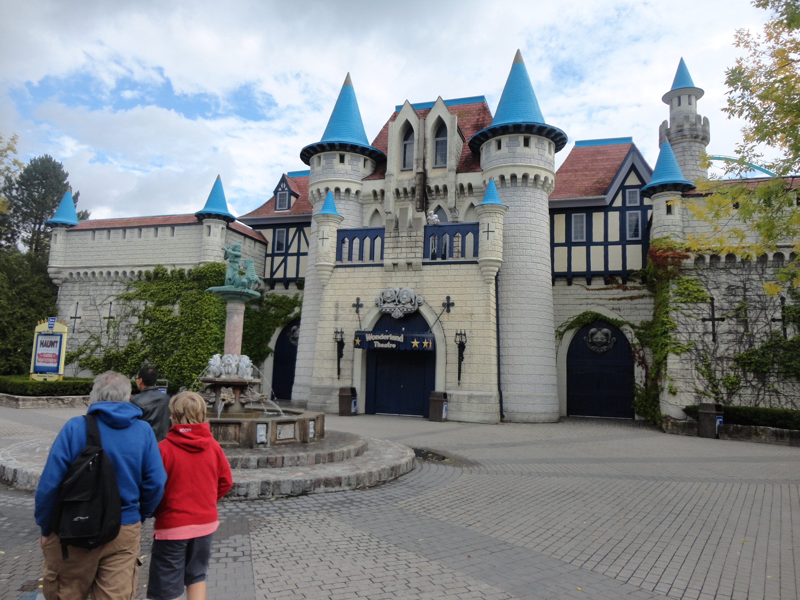 Castelo no Canada's Wonderland.